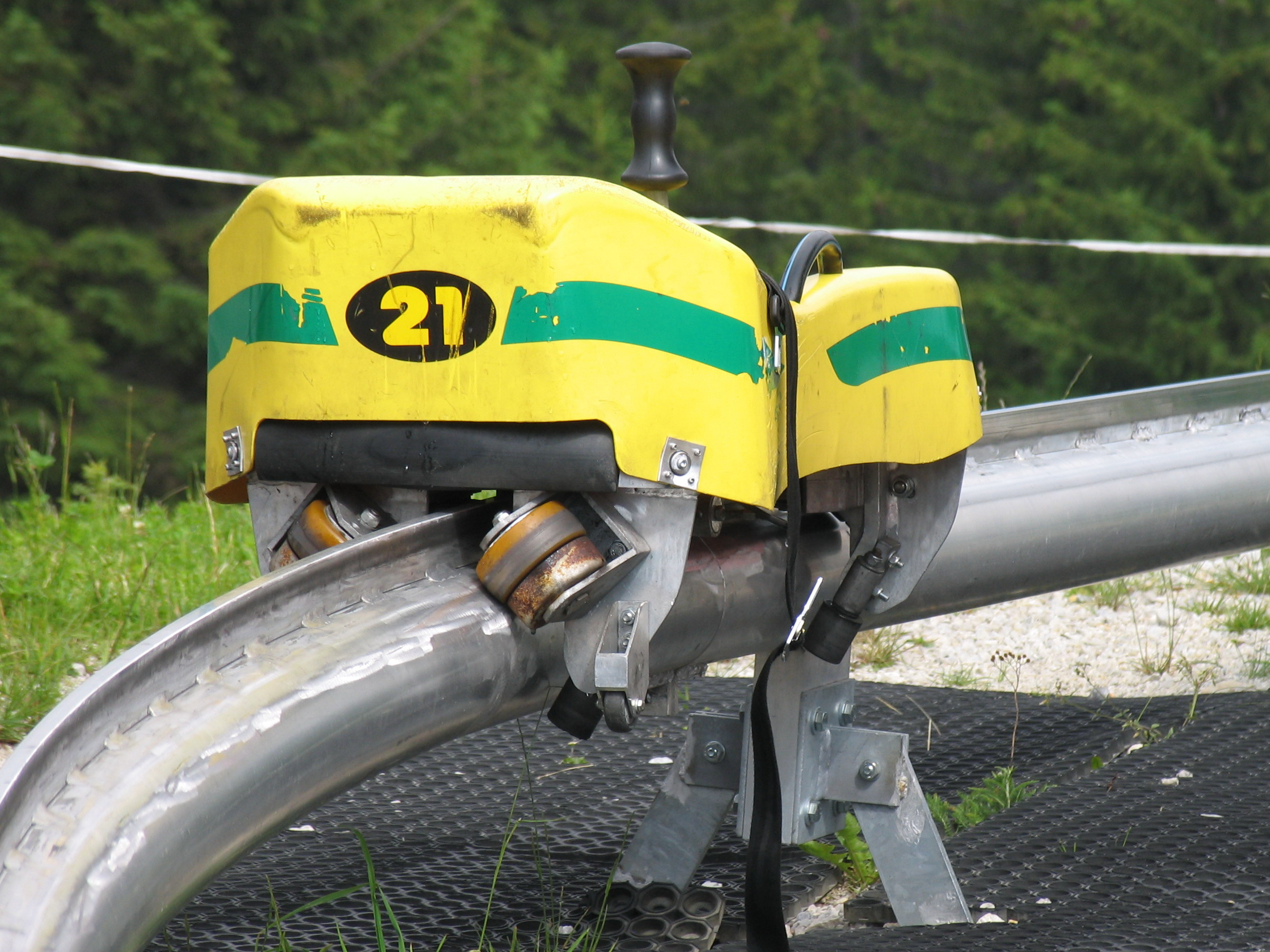 Brandauer Rodelschlitten, Sommerrodelbahn Stubai